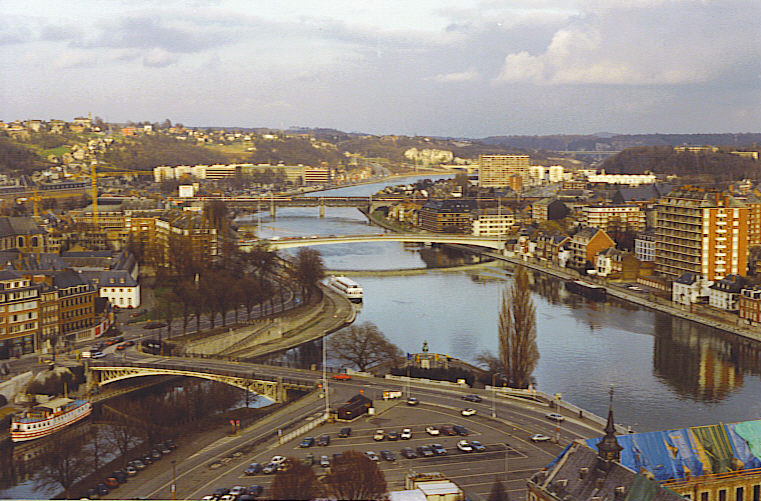 Monding van de Samber in de Maas